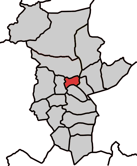 Situación da parroquia de Abadín no concello de Abadín